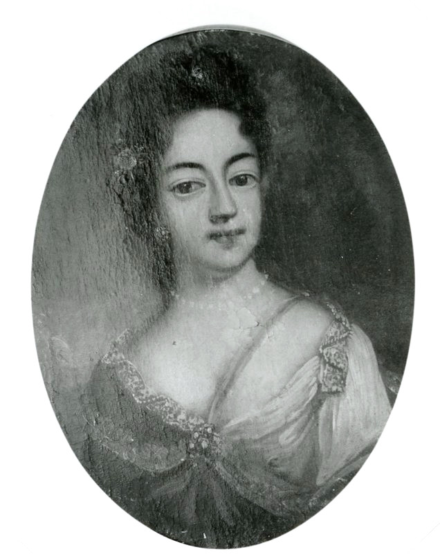 Gustaf Cruus hustru grevinnan Sidonia Juliana Lewenhaupt född 1659 och död 1737. Foto av oljemålning Publicerad i Björklinge förr och nu 1999.